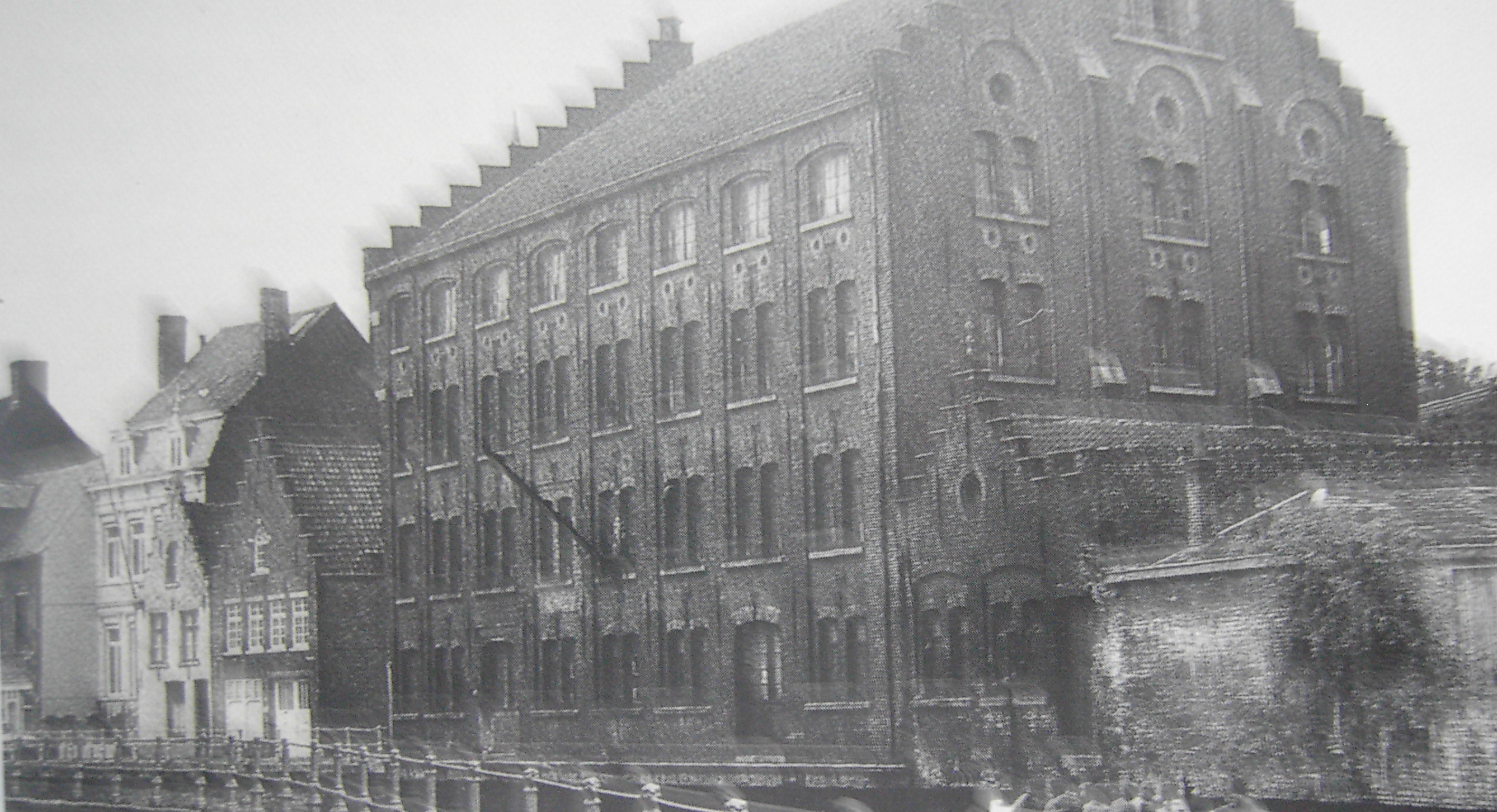 Oude chicoreifabriek - Nu Minneboplein - Brugge - West-Vlaanderen - België